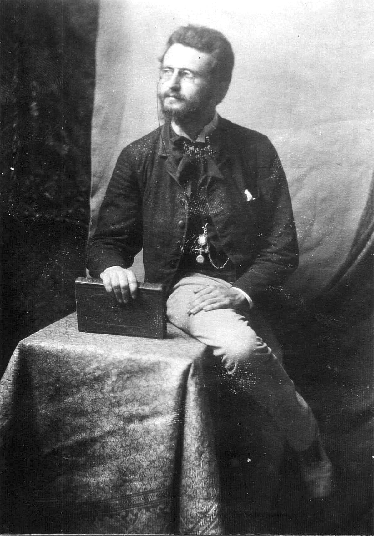 Porträtfotografie von August Menken während seines zweijährigen Auslandaufenthalts in Italien zwischen 1886 und 1898.